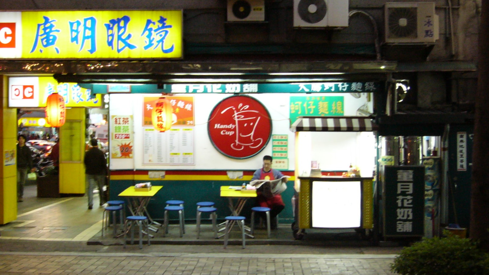 台北市士林區中正路「董月花奶舖」士林店，已結束營業。